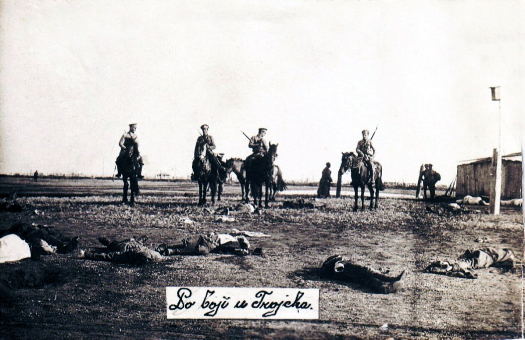 Белые после взятия Троицка, 18 июня 1918 г, Восточный фронт